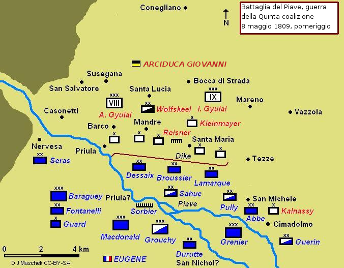 Mappa della battaglia del Piave del 1809